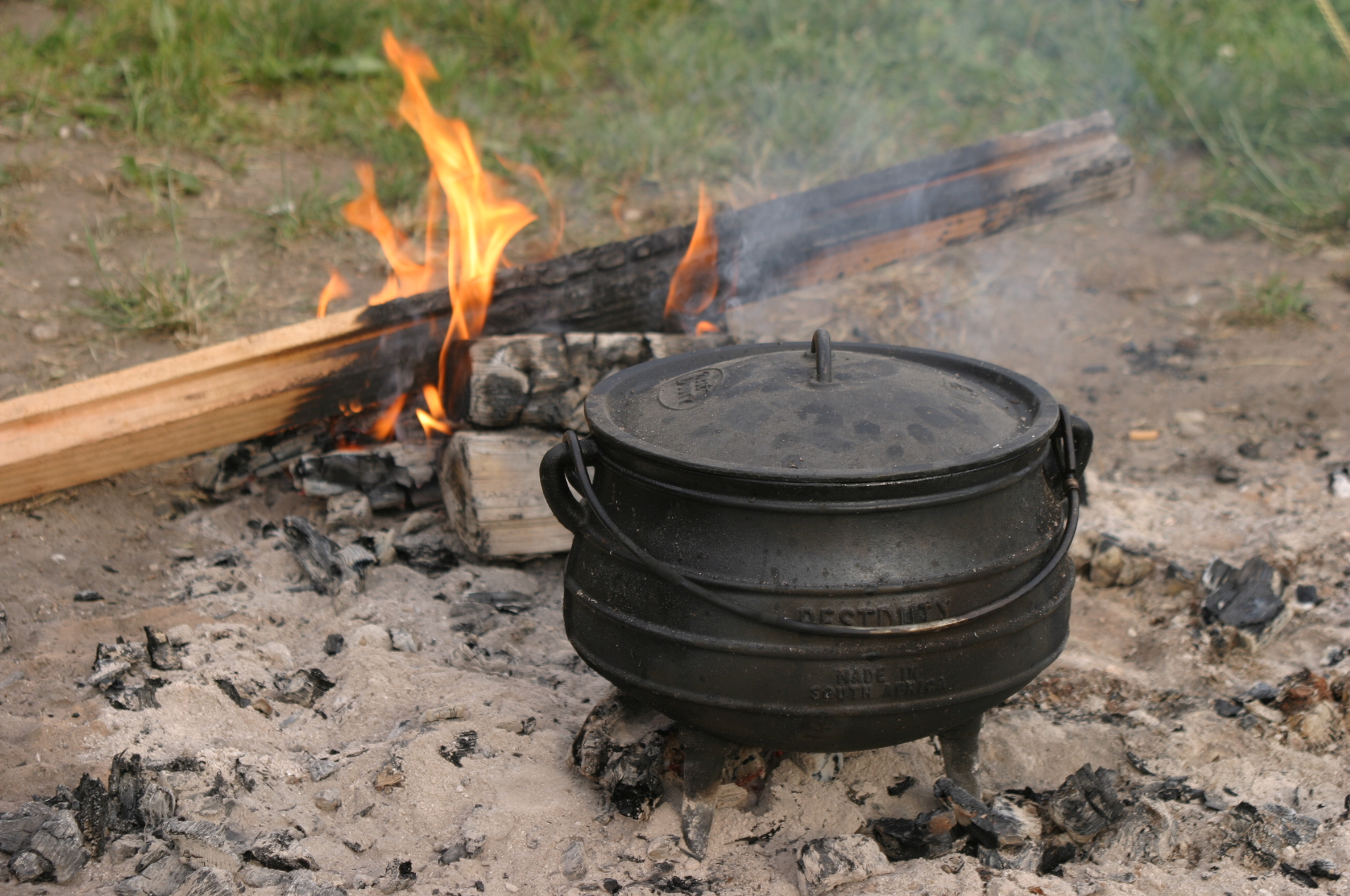 Potjie mit Lagerfeuer